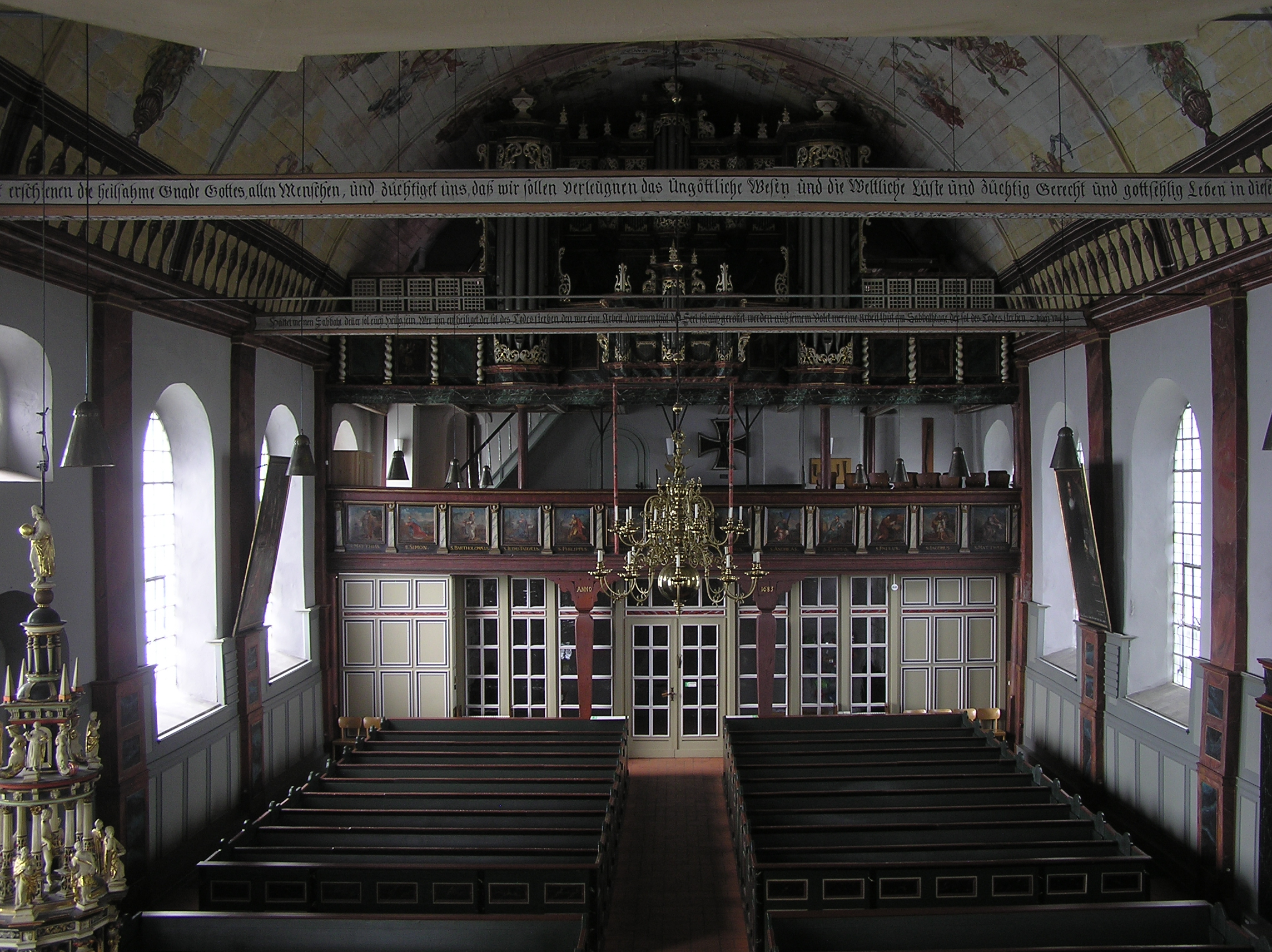 St. Pankratius, Neuenfelde